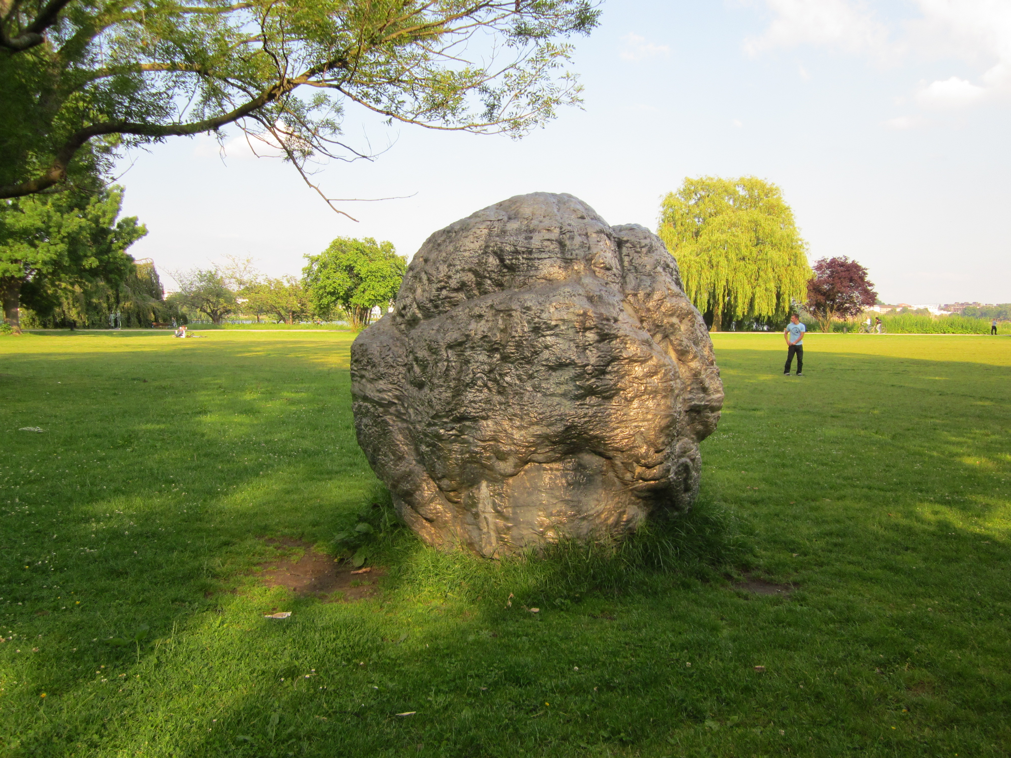 Die Skulptur Meteoritenwerkstatt von Thomas Stricker wurde 2000 geschaffen und steht im Alstervorland in Rotherbaum.